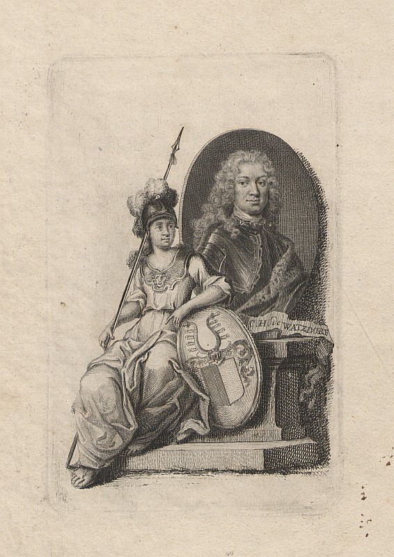 Original image description from the Deutsche Fotothek Porträt